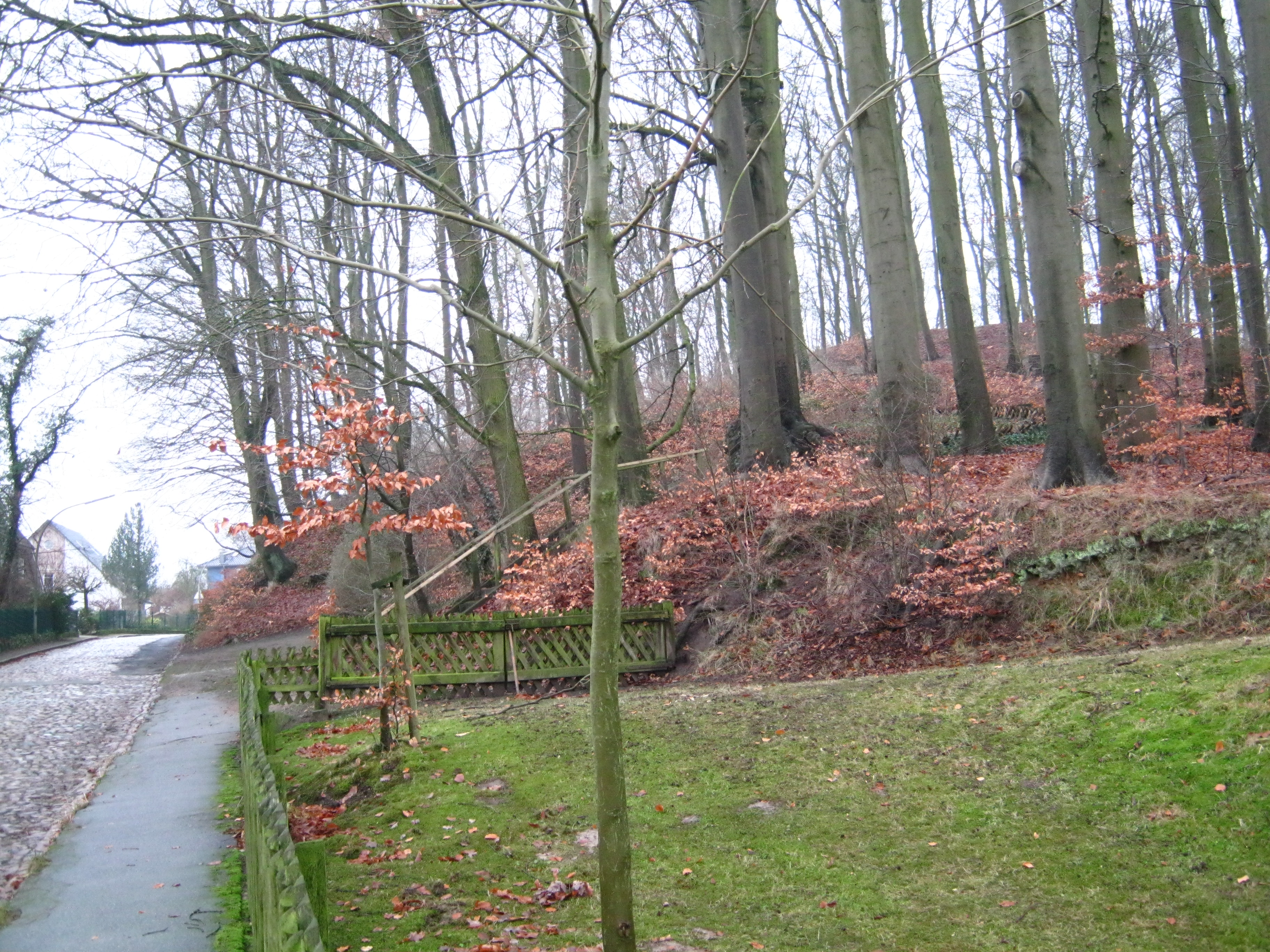 Straße "Am Burgberg" auf der Westseite des Burgbergs in Hamburg-Rönneburg.